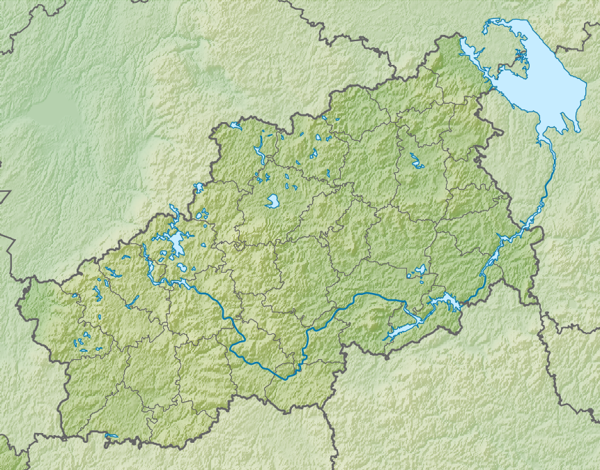 Физическая карта Тверской области, Россия. Координаты для GMT: -R30.529762/39.171089/55.476078/59.126232 Инструменты: GMT, Inkscape